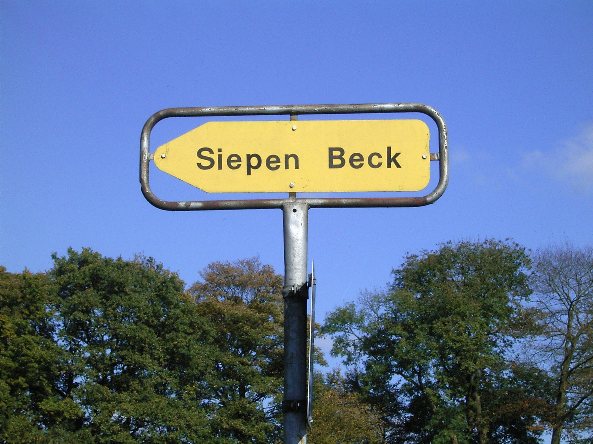 Radevormwald